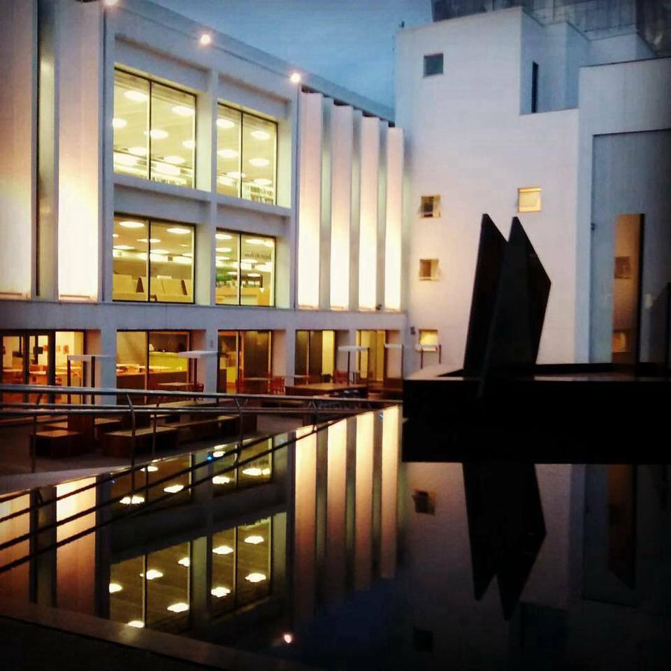 Foto tirada na Biblioteca Parque Estadual.